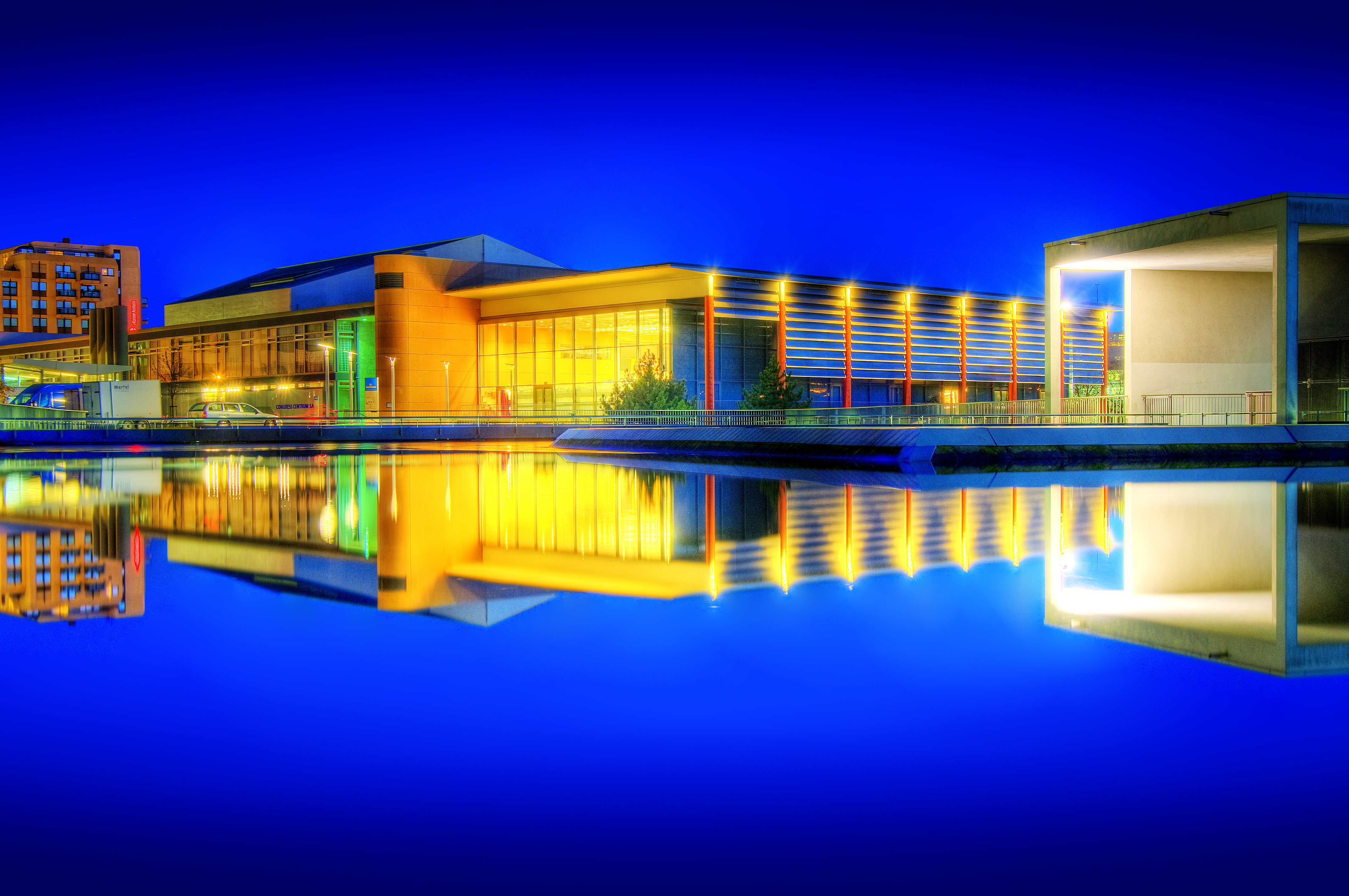 Congresshalle, Saarbrücken